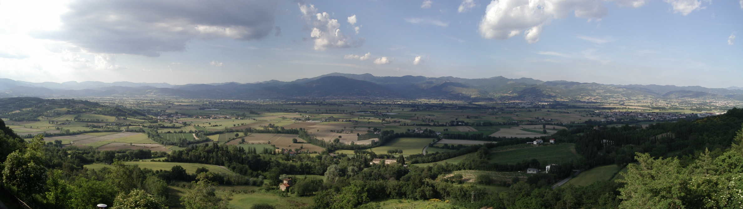 Haute vallée du Tibre prise de Citerna(Ombrie)